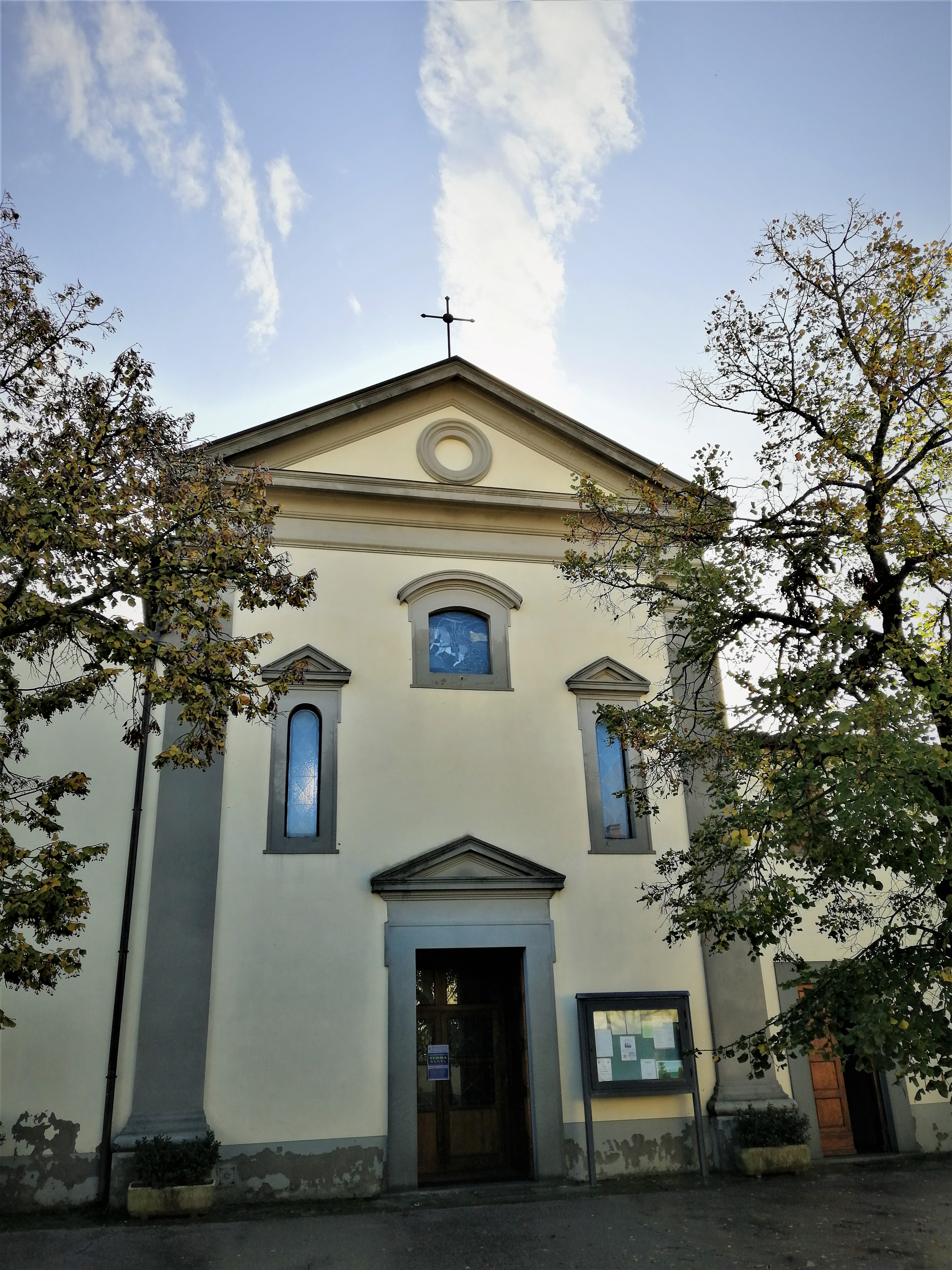 facciata_2019